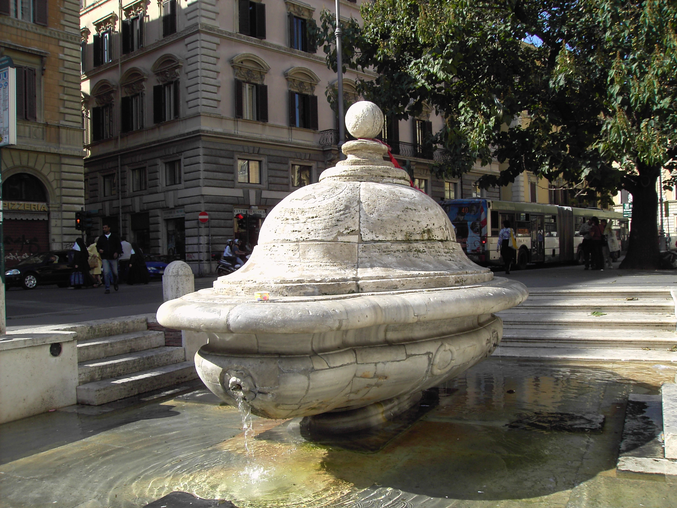 Roma, Fontana della Chiesa nuova a Corso Vittorio Emanuele, by Lalupa.